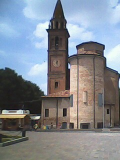 Il campanile di San Possidonio